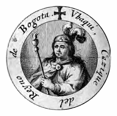 Templo de Nuestra Señora de Belén, Ubaque Cundinamarca